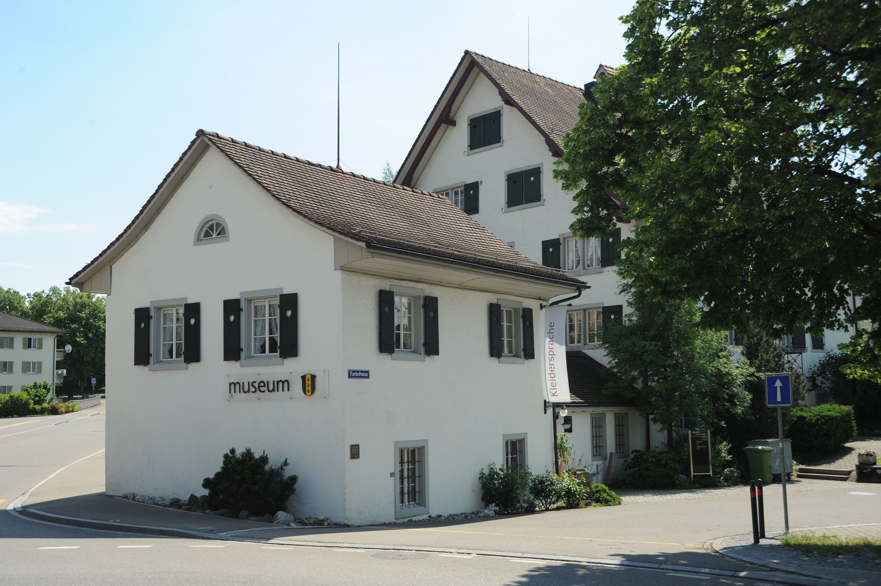 Das Museum Wetzikon befindet sich an der Farbstr. 1 in 8620 Wetzikon.